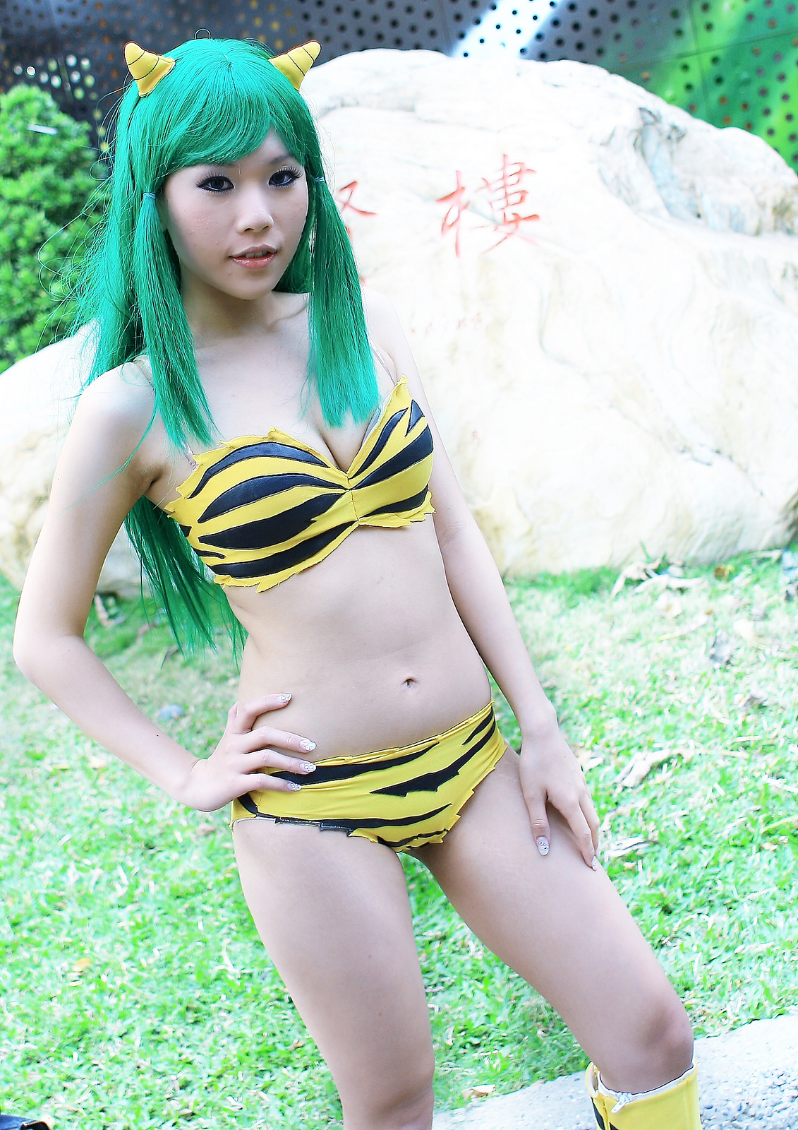 第9屆WS學園祭，《福星小子》拉姆cosplayer。